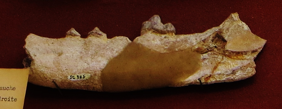 Fossil of Cynelos, an extinct mammal - Took the photo at Musee d'Histoire Naturelle, Paris